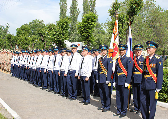 российская авиационная база Кант в Республике Киргизия